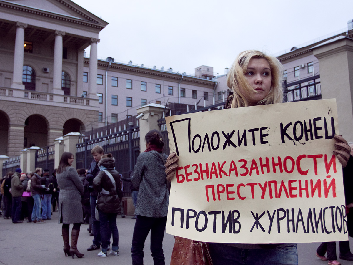 Пикеты с требованием найти и наказать заказчиков и исполнителей нападения на журналиста Олега Кашина и сбор подписей под письмом президенту РФ с требованием обеспечить безопасность журналистов у ГУВД Москвы на Петровке, 38